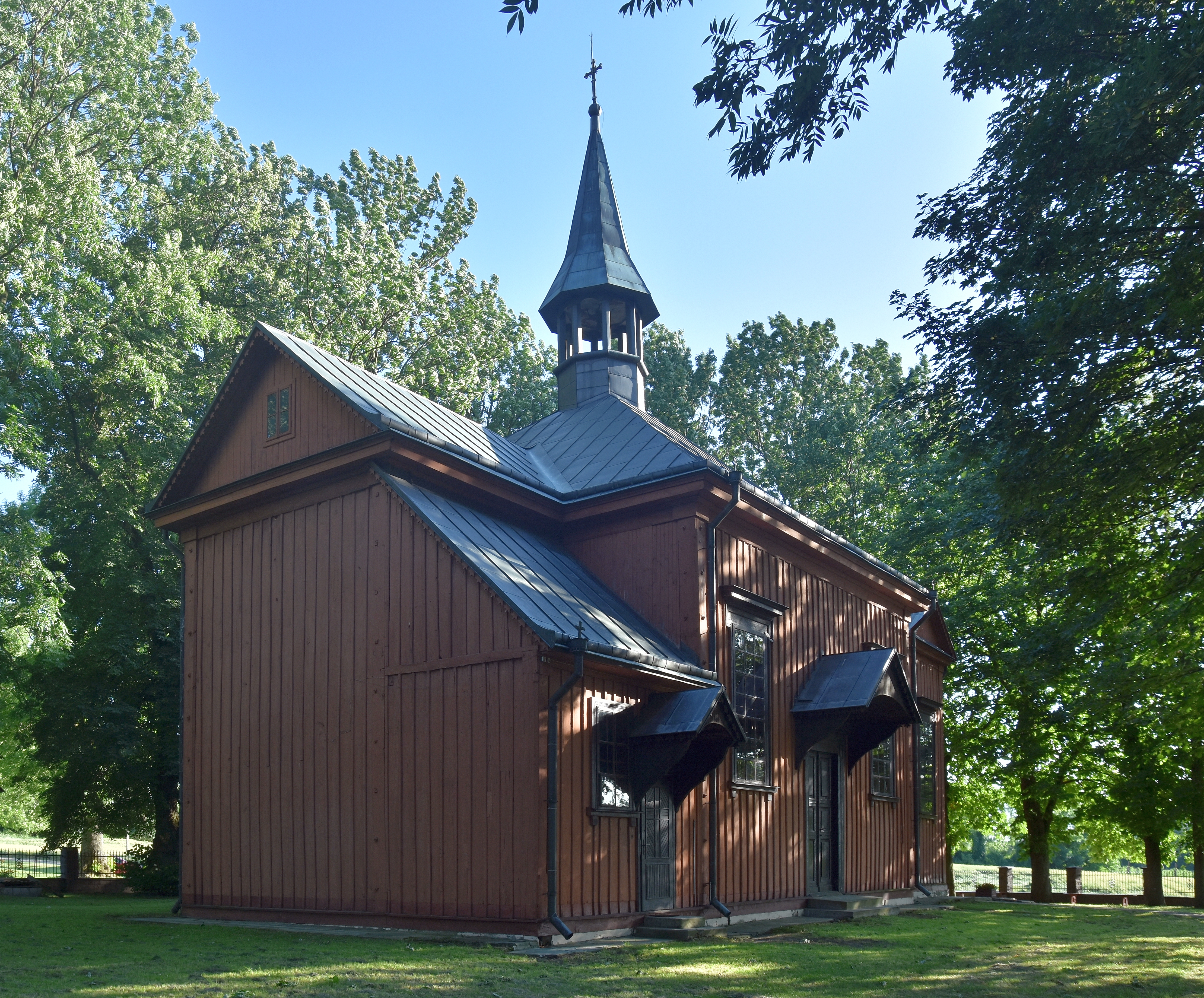 Wiszniów, Cerkiew greko-kat., ob. kościół rzym.-kat. św. Stanisława